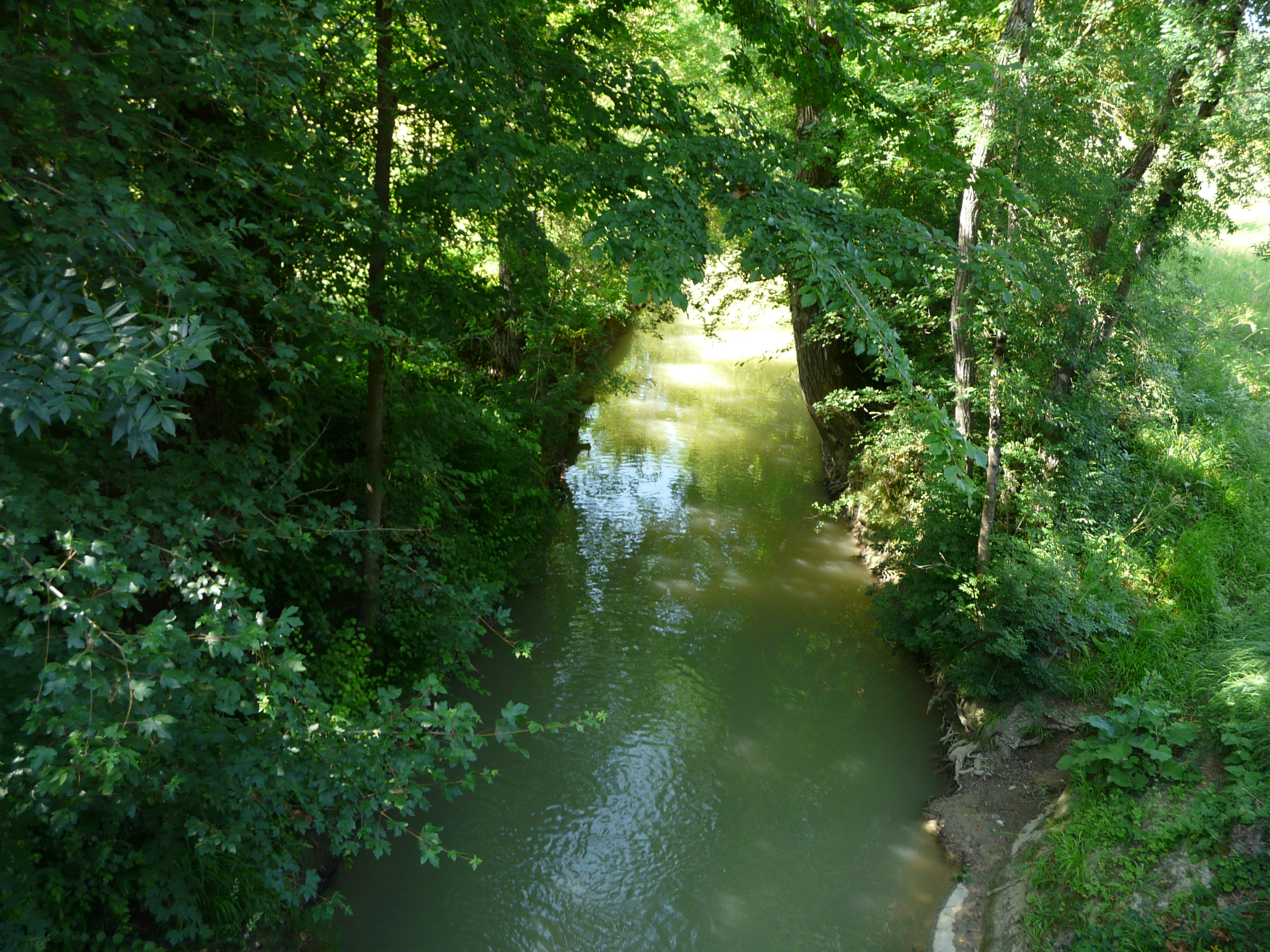 En aval de la route départementale 656, l'Auvignon marque la limite entre les communes de Calignac (à gauche) et Saumont (à droite) ; Lot-et-Garonne, France.